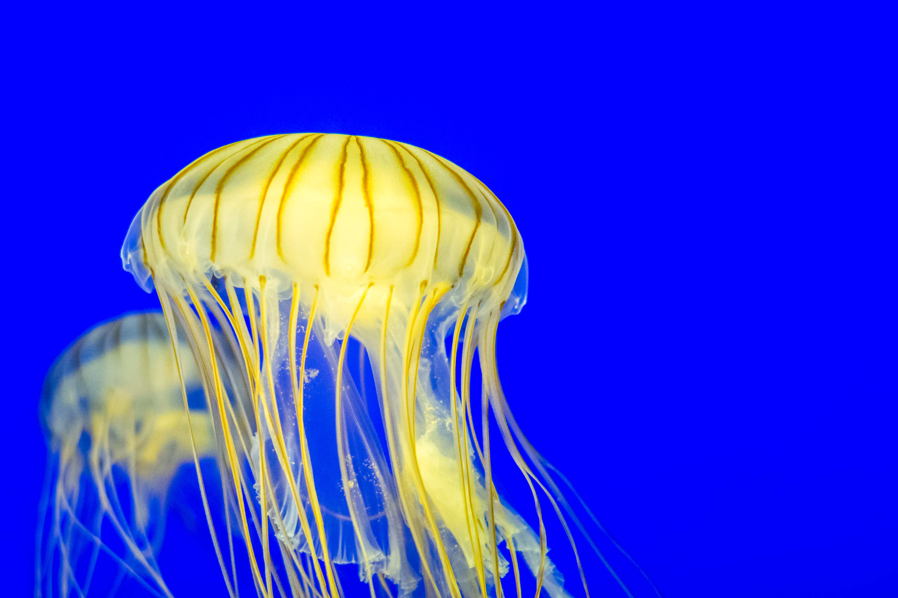 Les méduses striées de l'Aquarium La Rochelle